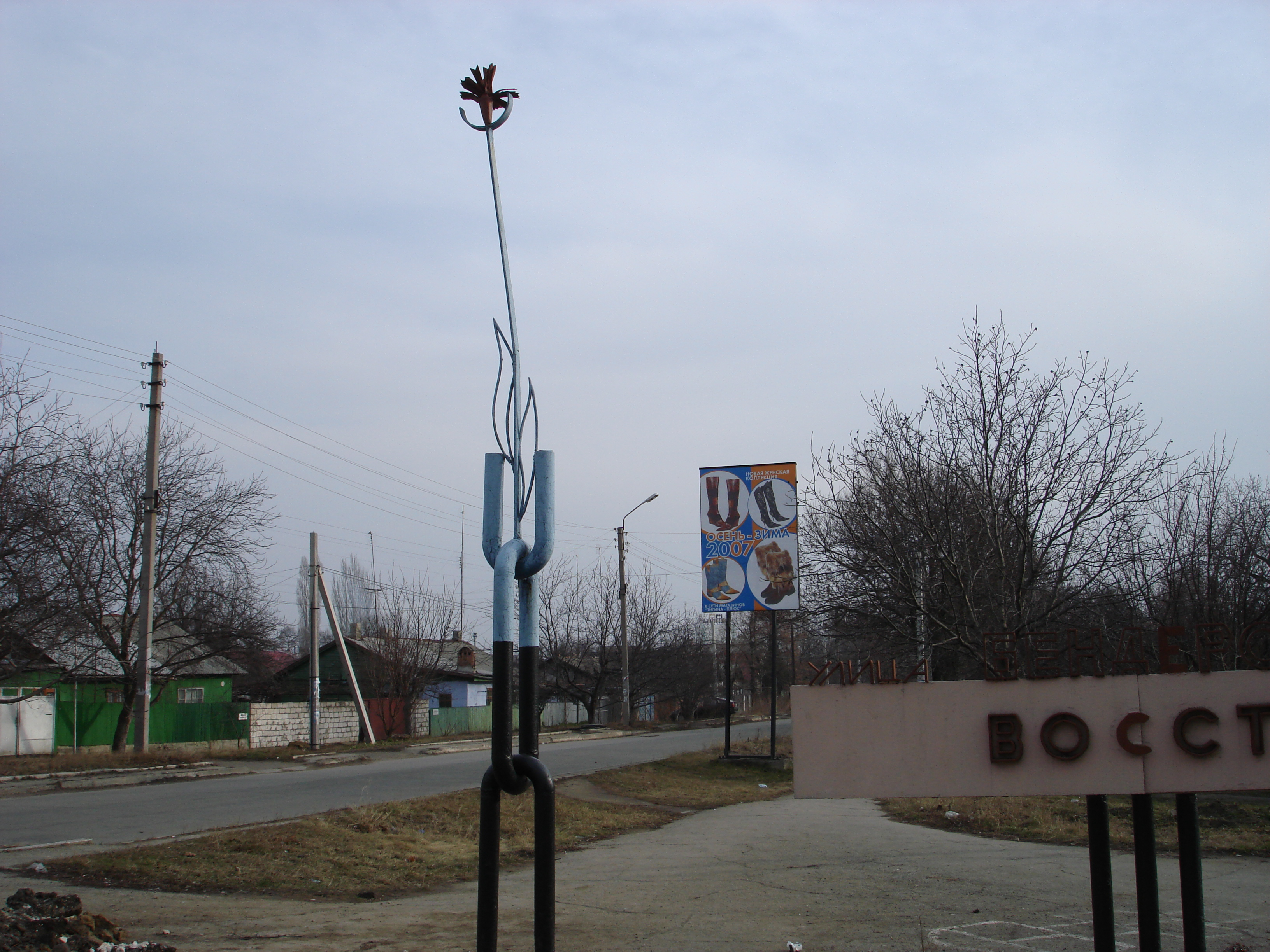 Памятник Бенденскому восстанию с названием улицы в городе Бендеры